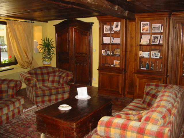 Un des salons d'accueil du l'Hotel Georges Blanc à Vonas en Bresse